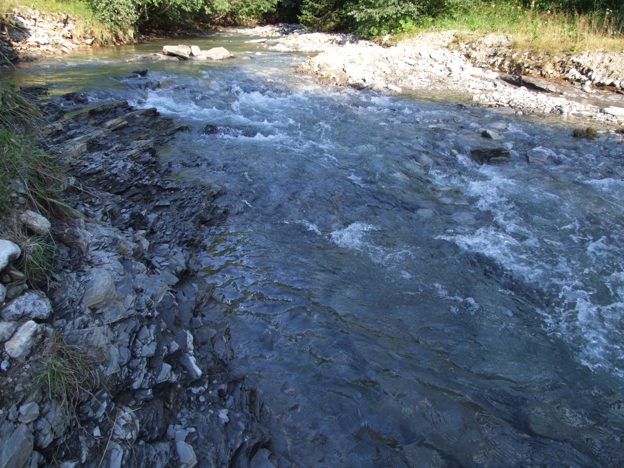 Cicha Woda Orawska w okolicy Szatanowej Polany